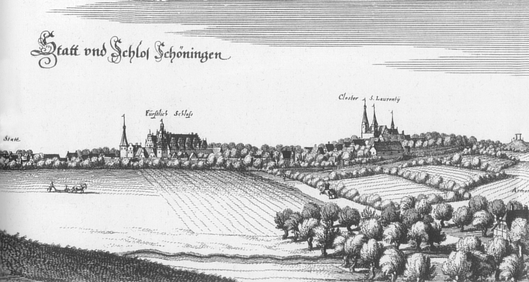 Schöningen nach Merian 1654